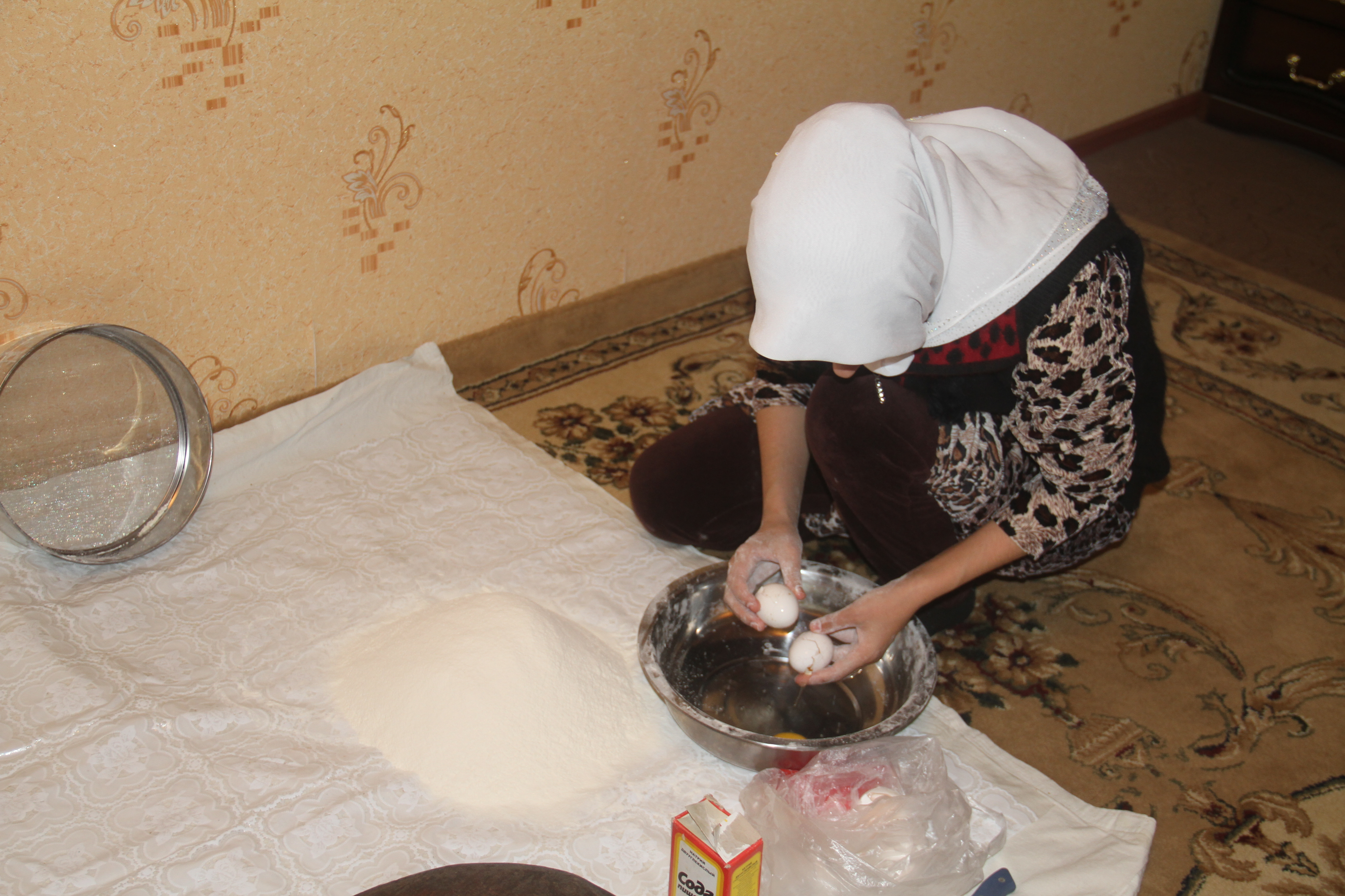 Тоҷикӣ: Чак-чак (2)